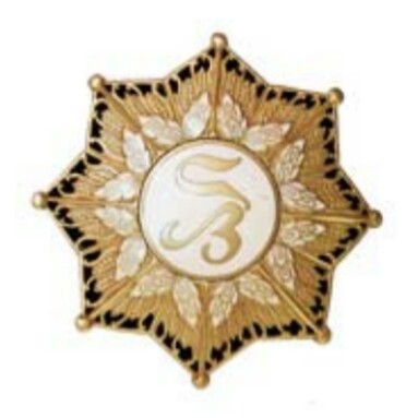 Order Gabrieli Silang